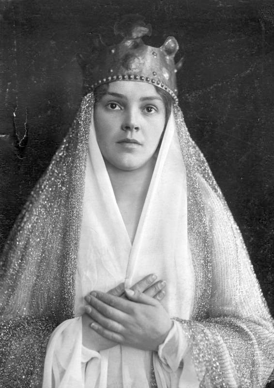 Leopoldine Konstantin Leopoldine Konstantin als "Maria". Zur erfolgreichen Aufführung von Eduard Stuckens "Gawân" in den Berliner Kammerspielen. Abgebildete Personen: Konstantin, Leopoldine: Schauspielerin, Deutsches Theater Berlin GND 116331577